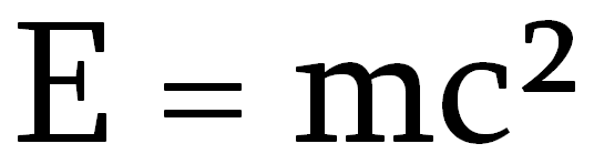 Formule van Einstein (lettertype = Sylfaen).